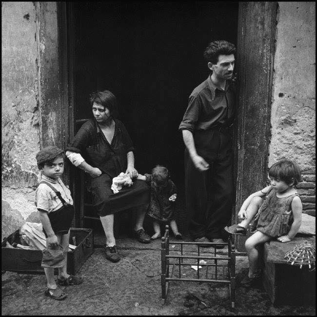 Wayne Miller - Napoli - Famiglia povera davanti ad un basso ("'o vascio").